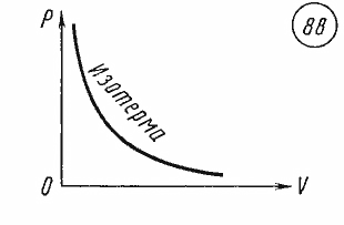 Қазақша (кирил): Изотермиялық процесс